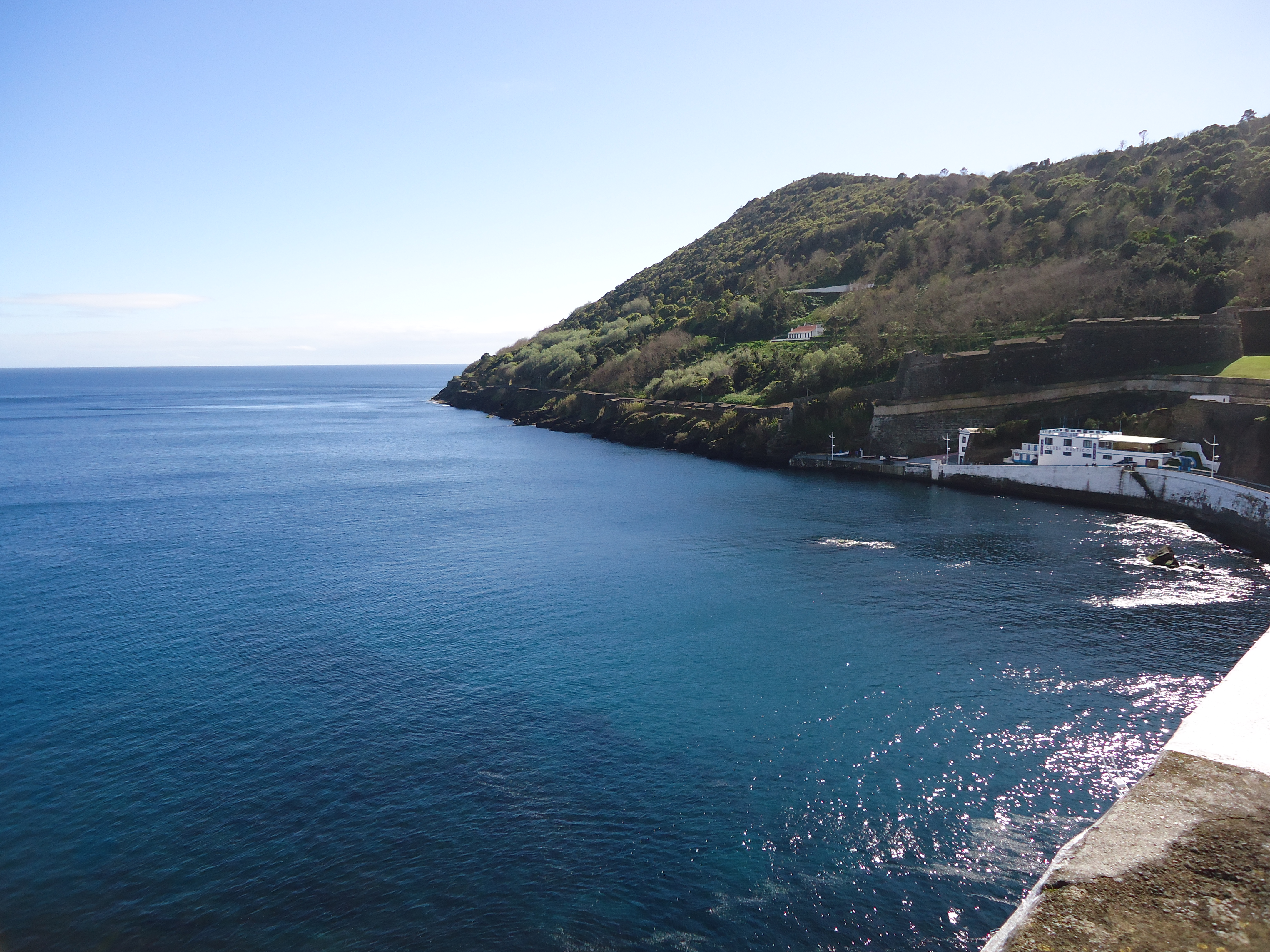 Baía de Angra do Heroísmo, ilha Terceira, Região Autónoma dos Açores, Portugal: vista do ponto de afundamento do "Lidador".